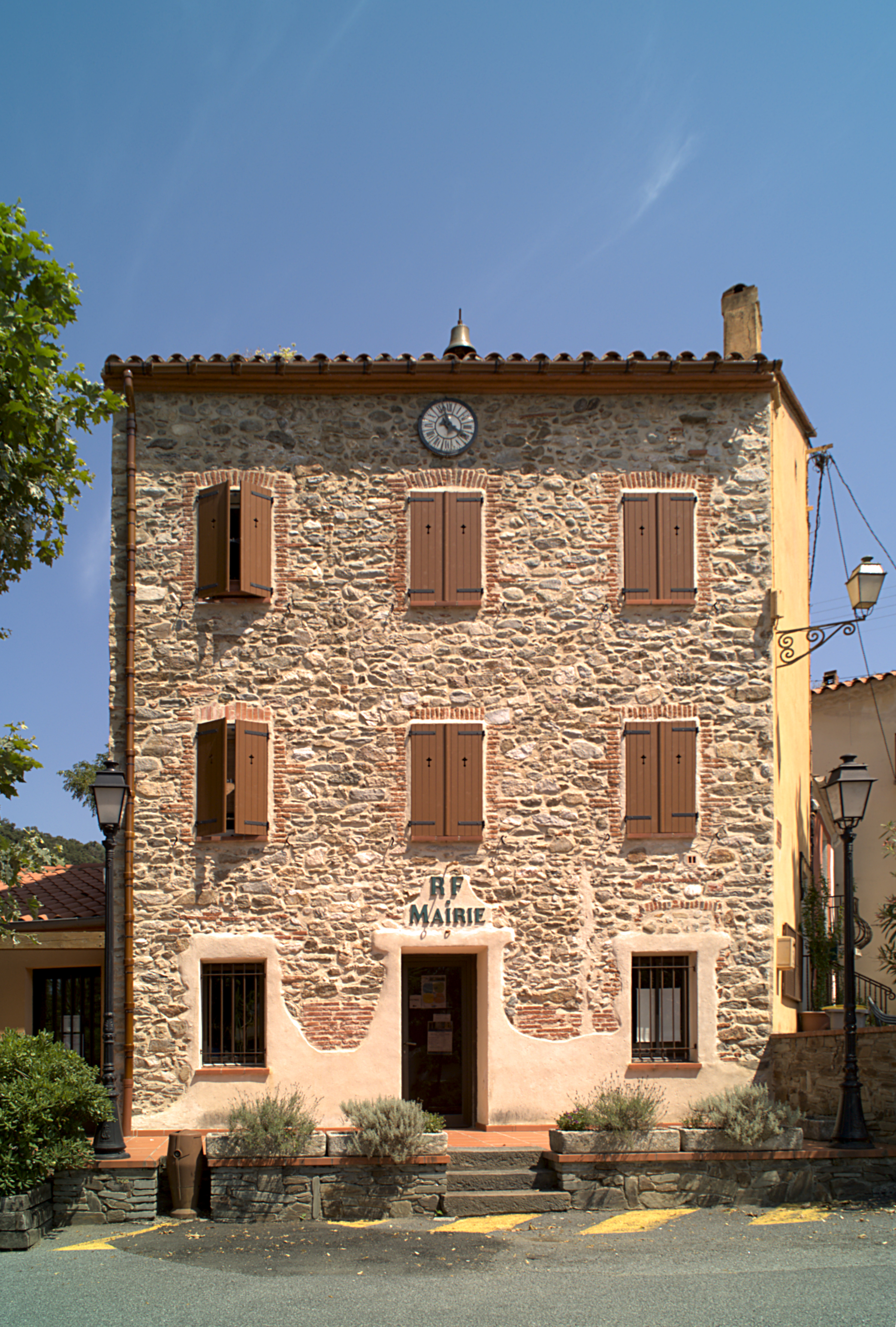 Mairie, La Cluse Haute, Les Cluses (Pyrénées-Orientales, Languedoc-Roussillon, France)